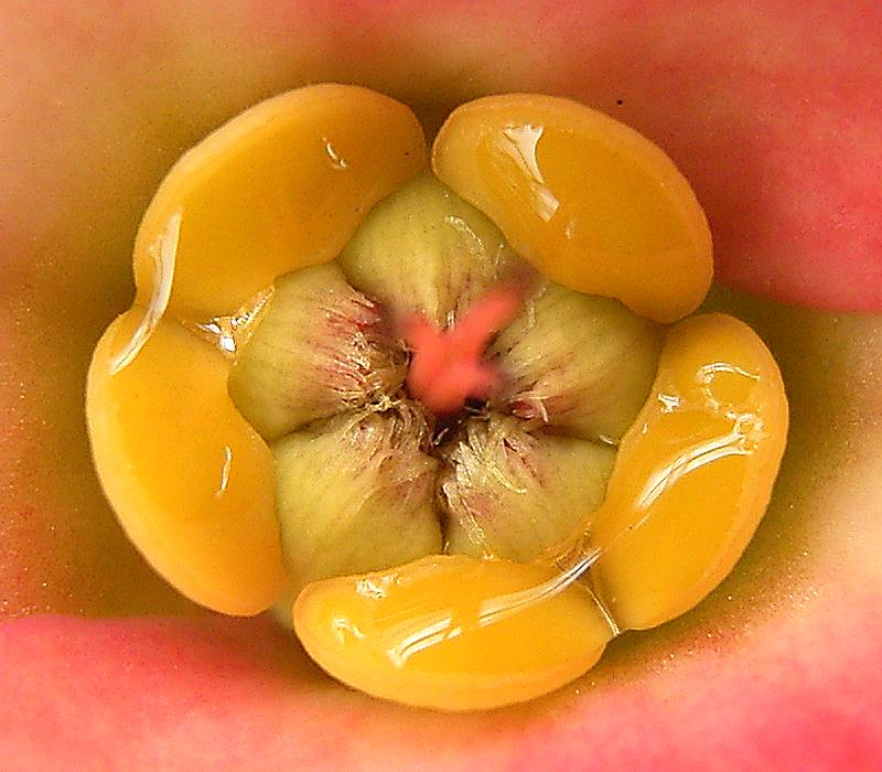 Euphorbia milii, cyathium close-up